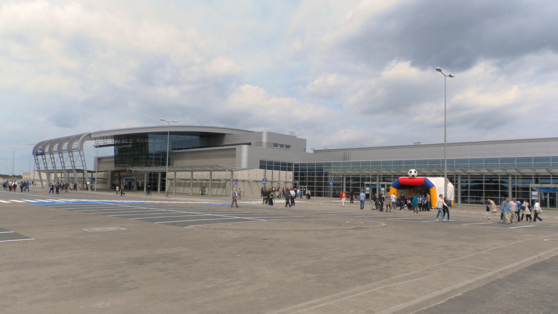 Nowy terminal T3 (przyloty) na poznańskim lotnisku - drzwi otwarte 03.06.2012